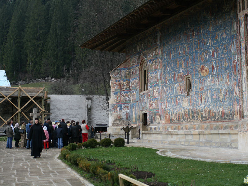 Manastirea pictata Voronet, monument UNESCO; foto Iulian Hopulele